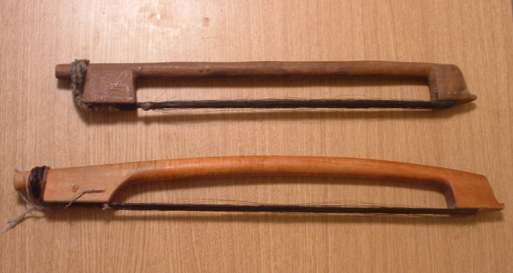 Népzenében használt rövid nagybőgővonók